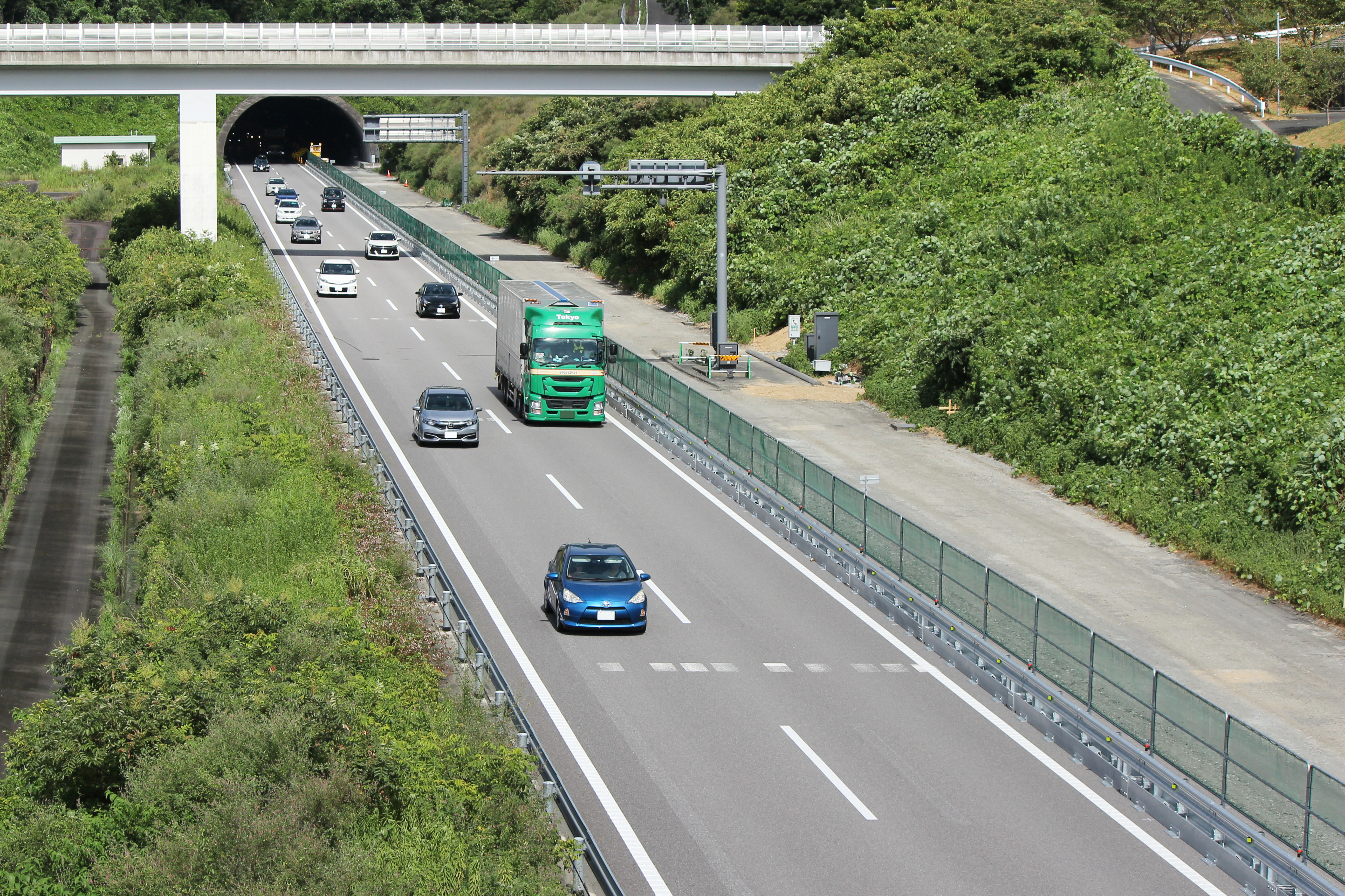 6車線化工事中のE1A新東名高速道路（浜松SA - 浜松いなさJCT間）